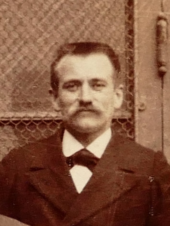 Georges Colomb (nom de dessinateur Christophe), professeur de sciences au lycée Condorcet (Paris, 8e arrond.) de 1882 à 1885. Détail d'une photo de groupe de Pierre Petit vers 1885.